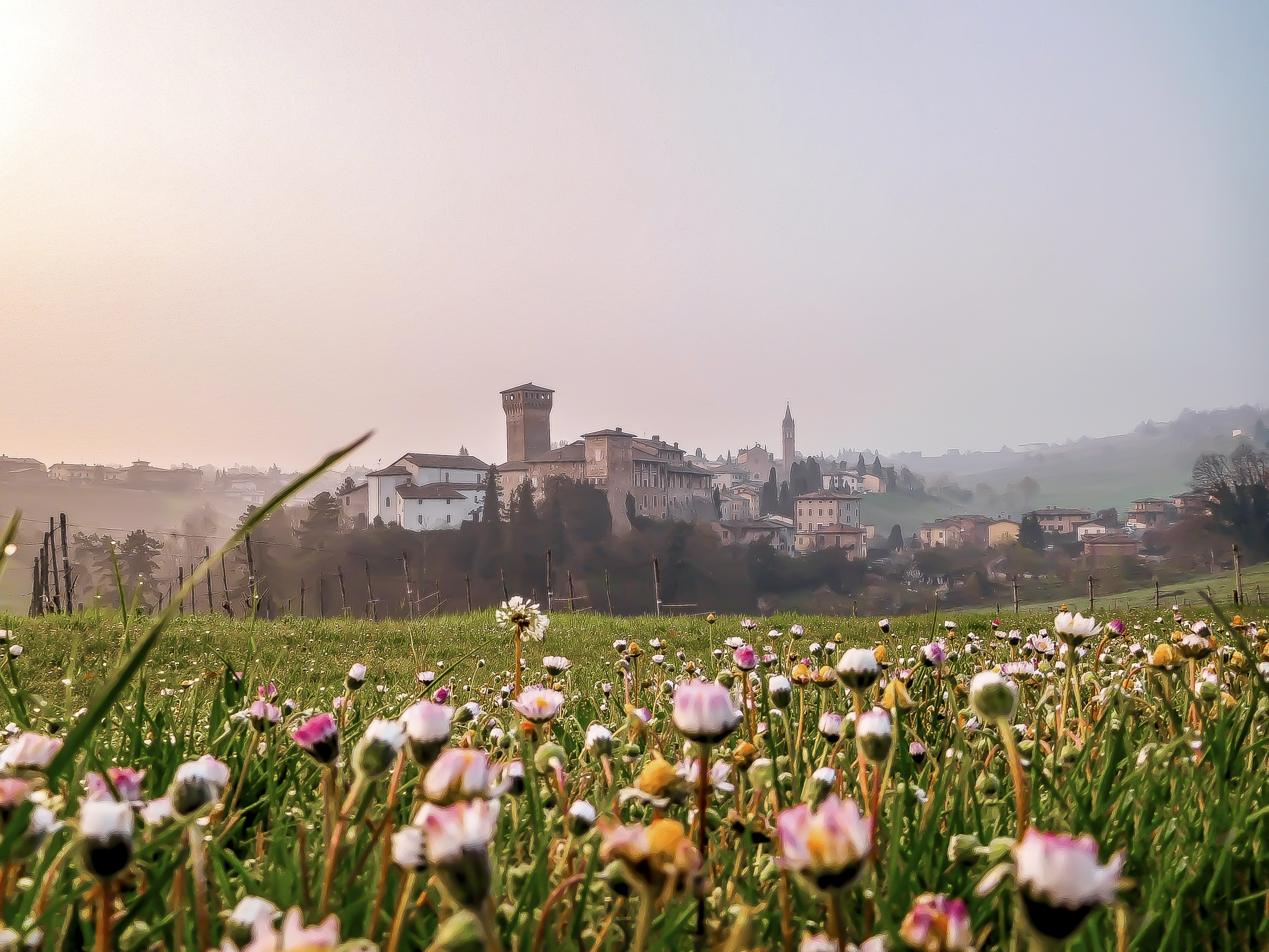 castello di Levizzano Rangone This is a photo of a monument which is part of cultural heritage of Italy.